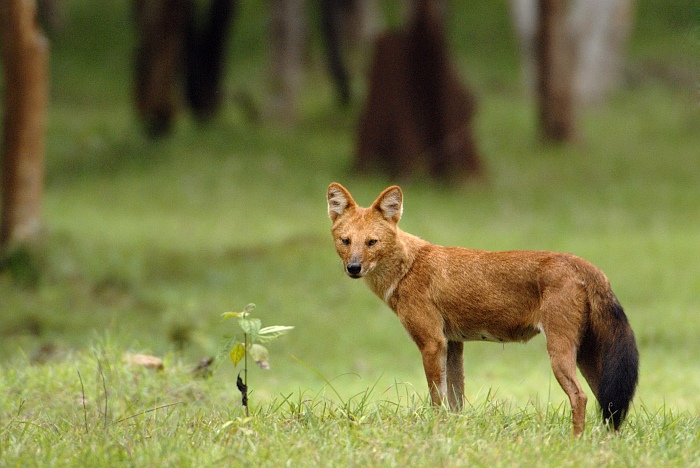 Cuon alpinus (Dhole)